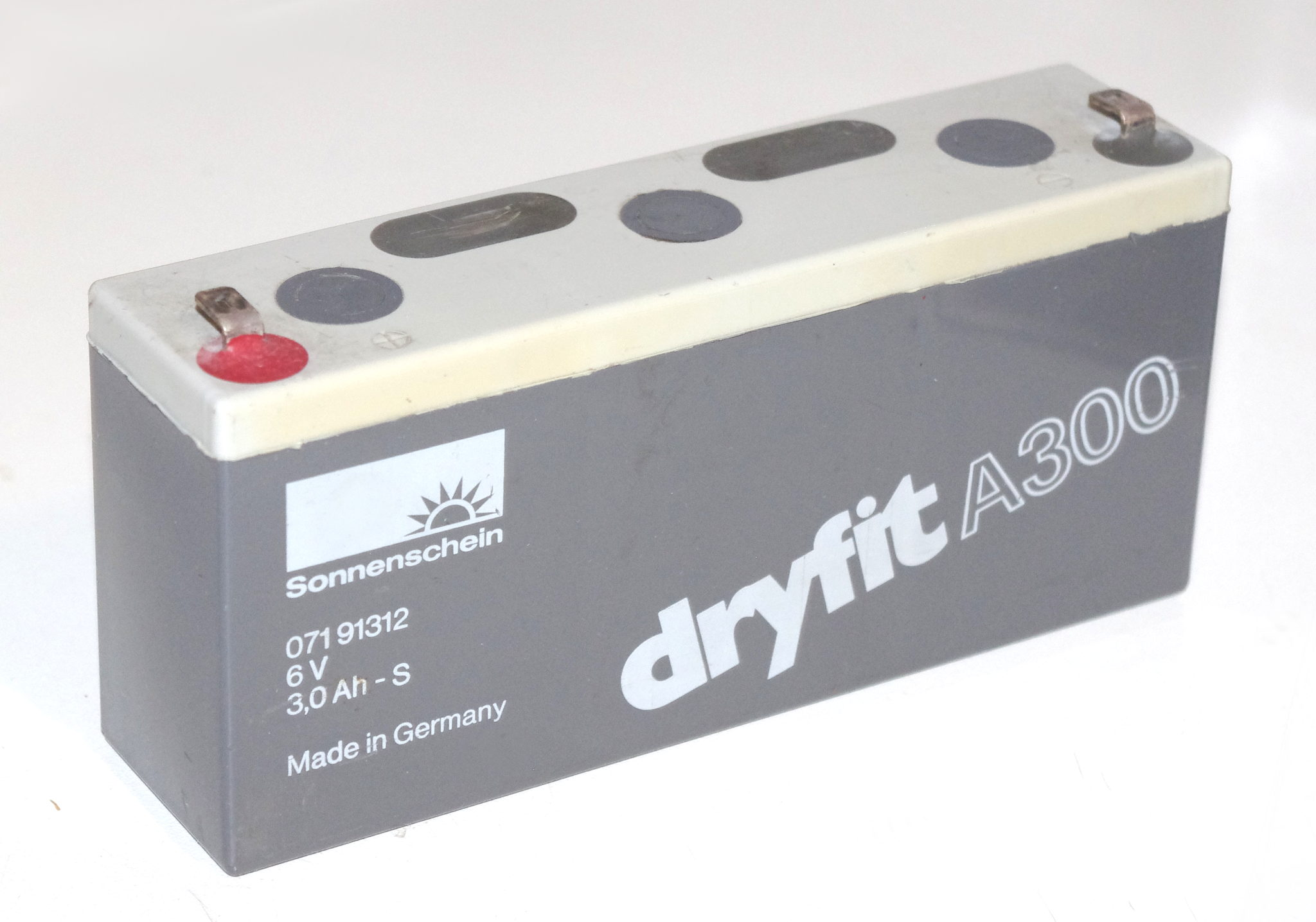 Dryfit A300 Blei-Gel-Akkumulator